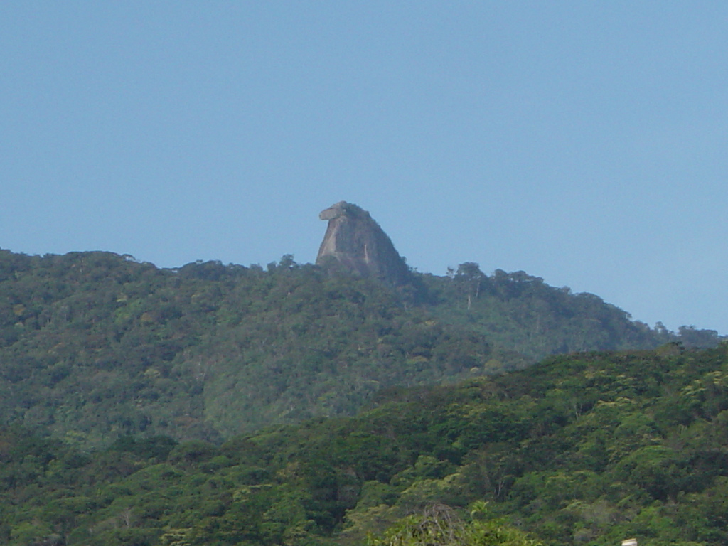 este eh o pico do papagaio da ilhagrande com 982 metros de altitude; eh o ponto mais alto da ilha de onde eh possivel ver quase todas suas praias e pontas, e tambem paraty, angra, mangaratiba, sepetiba, guaratiba e tambem as montanhas do rio de janeiro